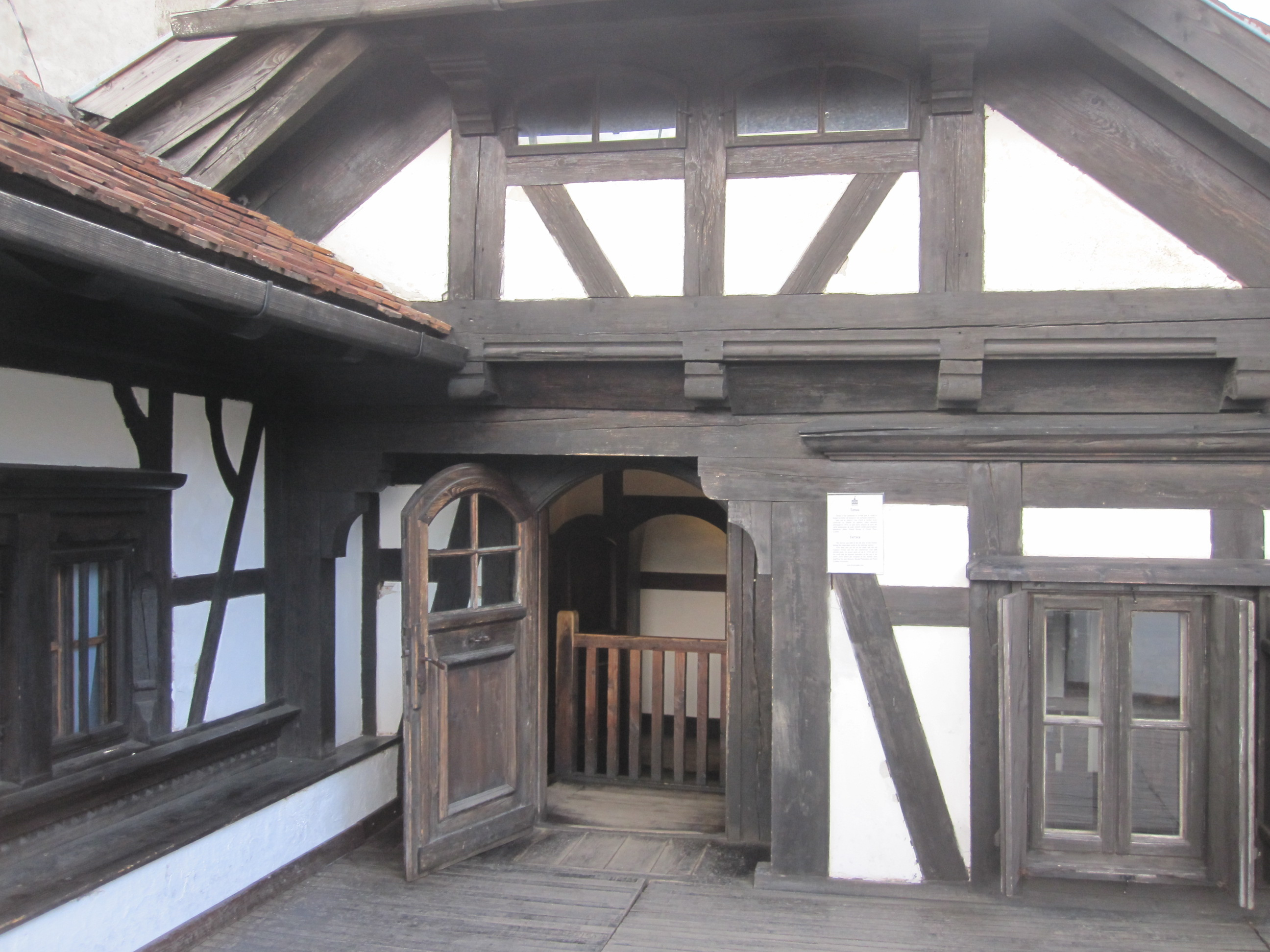 Терраса замка Бран